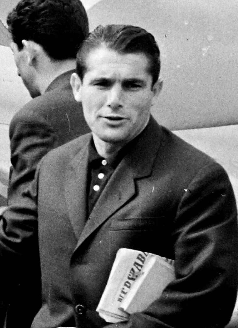 (cropped) Sándor Károly, Csikar (Szeged, 1928. november 26. – Budapest, 2014. szeptember 10.) labdarúgó, jobbszélső. Kiváló szélső csatár volt. Gyors felfutásairól és éles szögből elért góljairól volt híres. Az Aranycsapat idején Budai volt a riválisa a poszton.